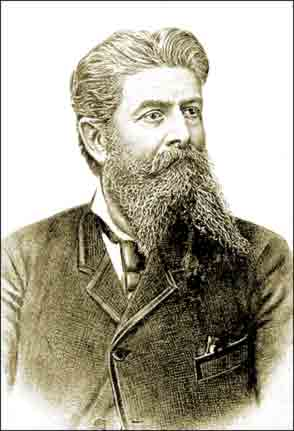 Wilhelm Junker (russisch: Василий Васильевич Юнкер; * 6. April 1840 in Moskau; † 13. Februar 1892 in Sankt Petersburg) war ein deutsch-russischer Afrikaforscher.